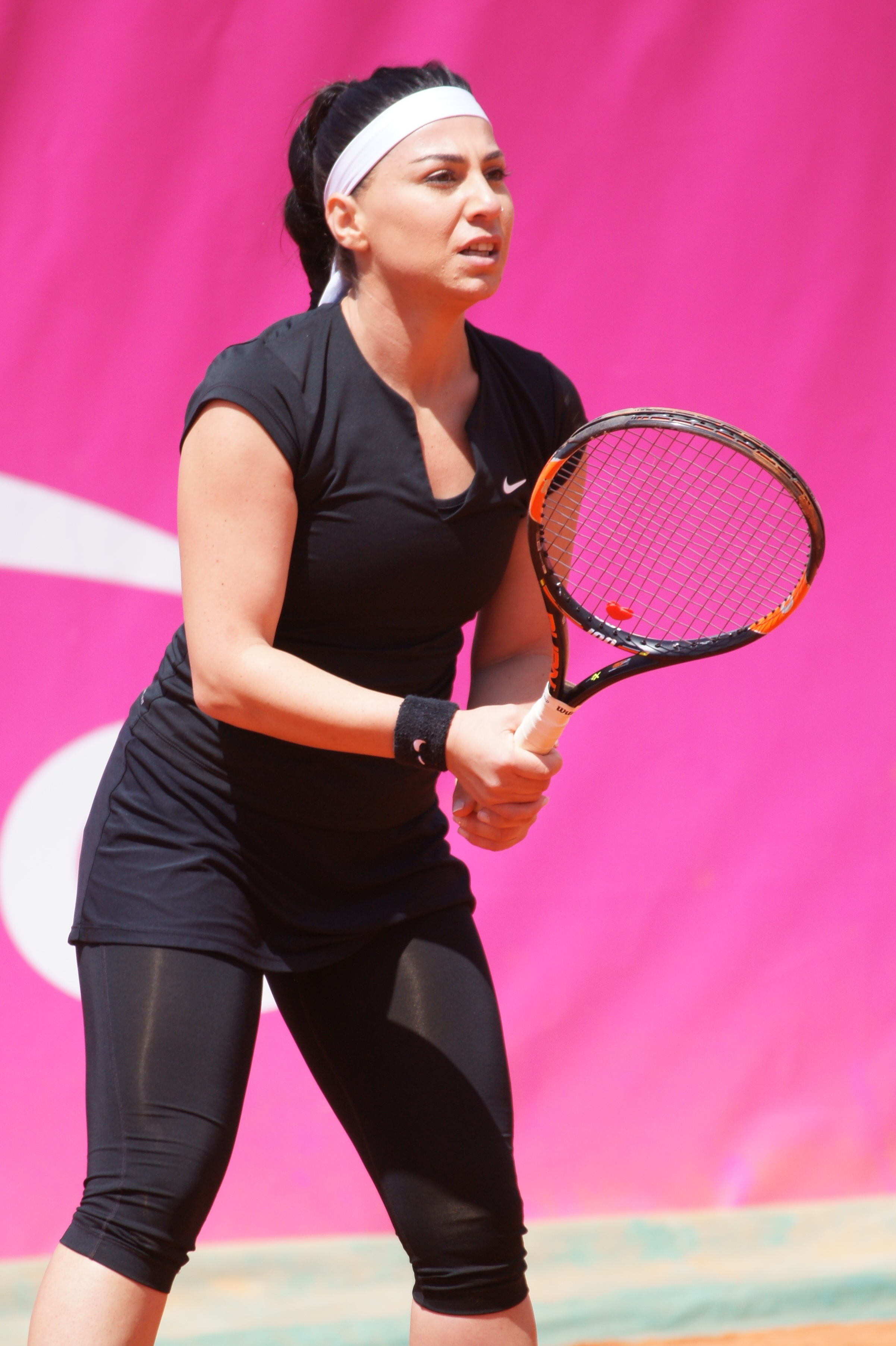 Ekaterine Gorgodze Open ITF Cagnes 2016